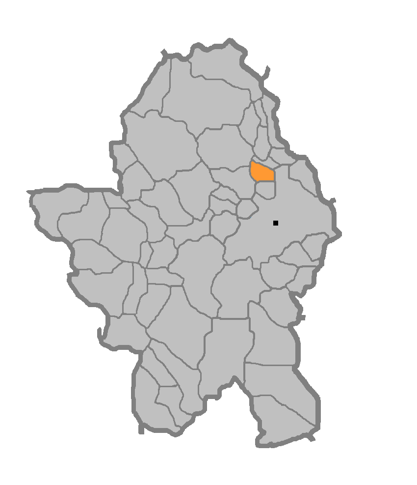 Мјесна заједница Шарговац